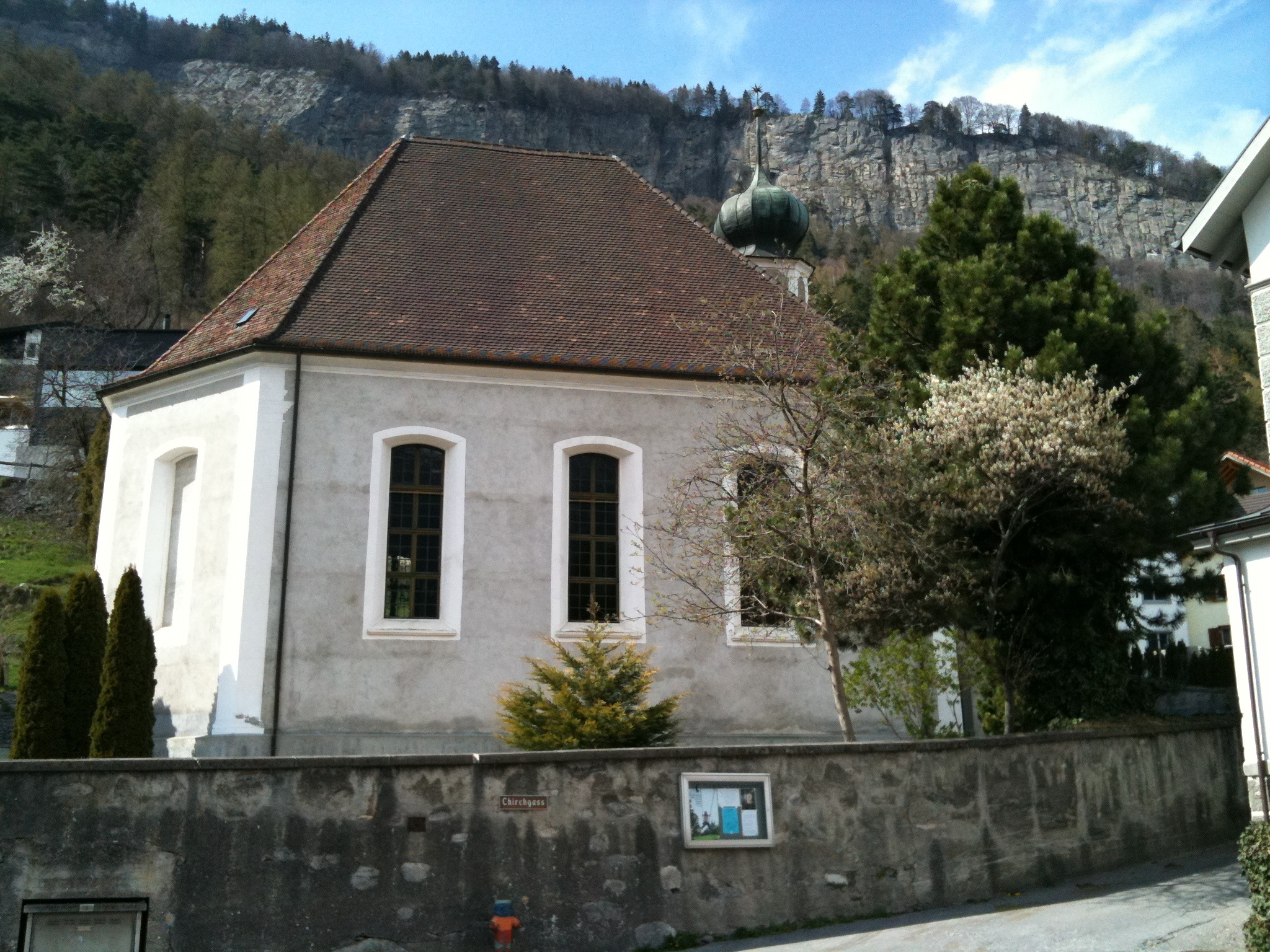 reformierte Kirche Haldenstein, Kanton Graubünden